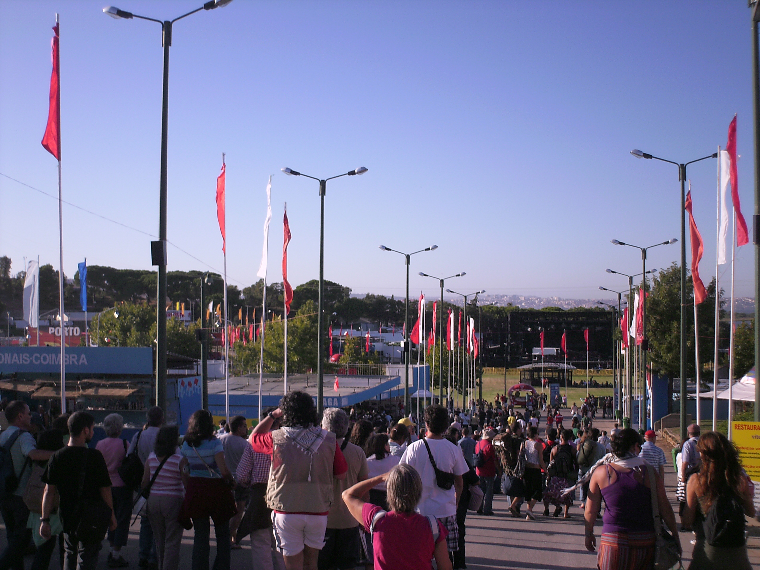 Vista geral dentro recinto. (Festa do Avante - 2009)